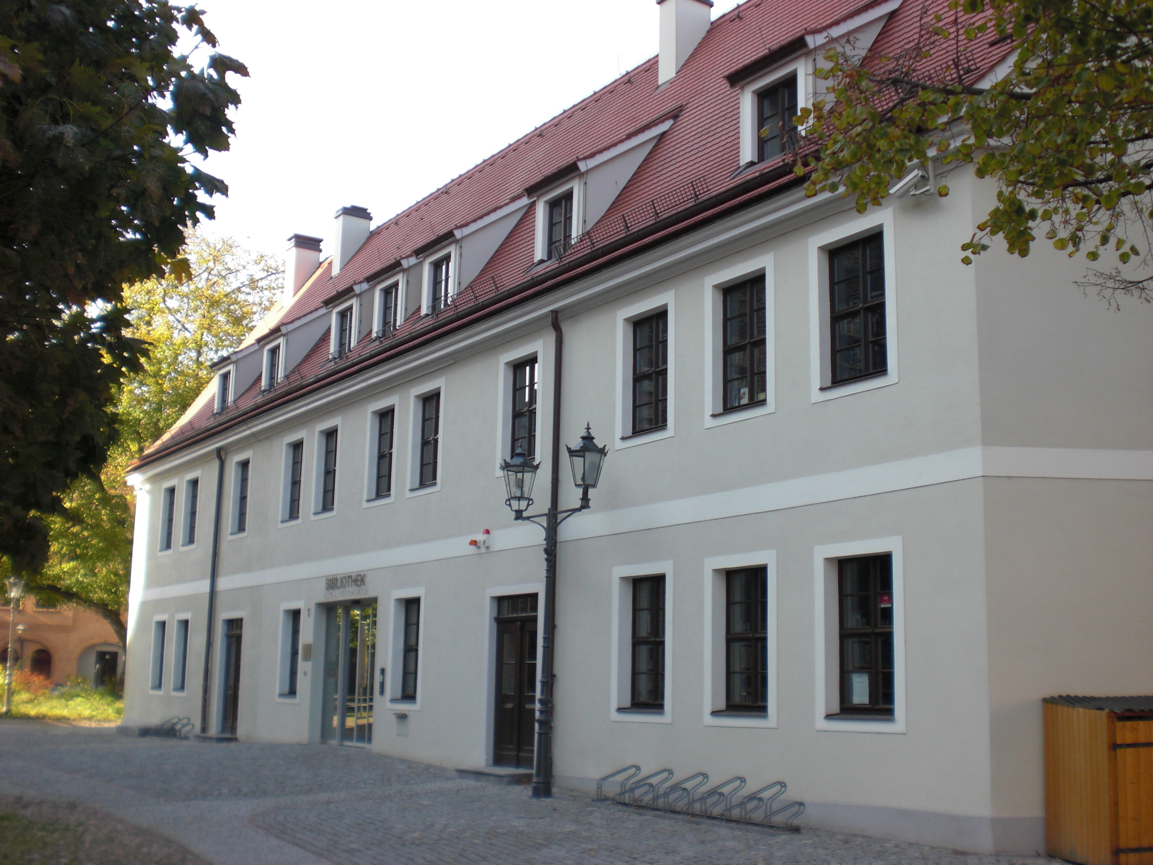 Stadtbibliothek an der Peter und Paul Kirche, Delitzsch